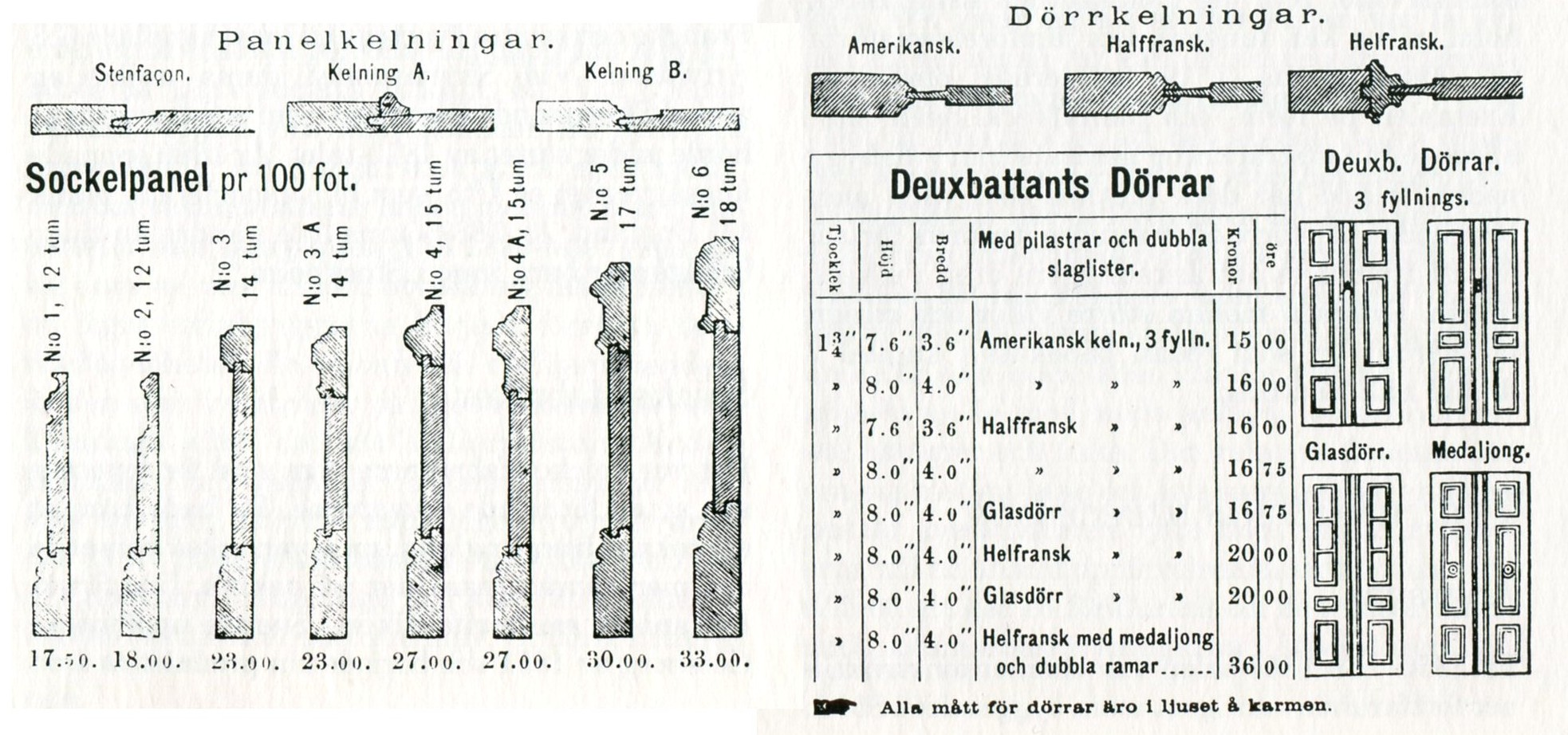 Ur Ekmans priskurant för snickerer